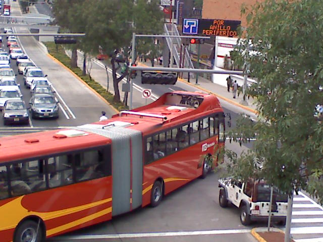 Metrobus a su paso por La Joya. Mexico D.F.